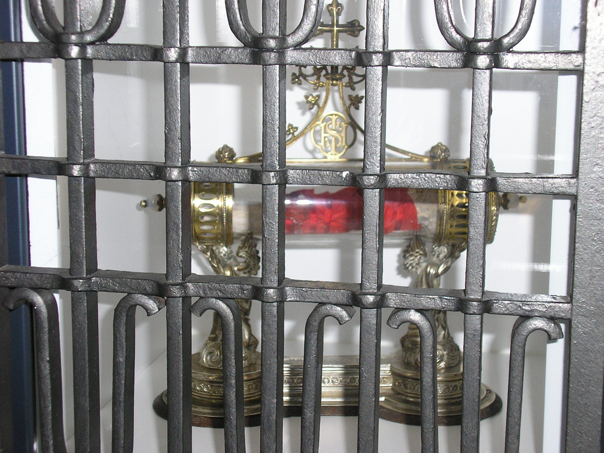 Reliquiar des hl. Cyriakus in St. Cyriakus, Neuss-Grimlinghausen